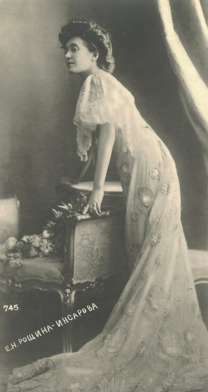 Рощина-Инсарова, Екатерина Николаевна